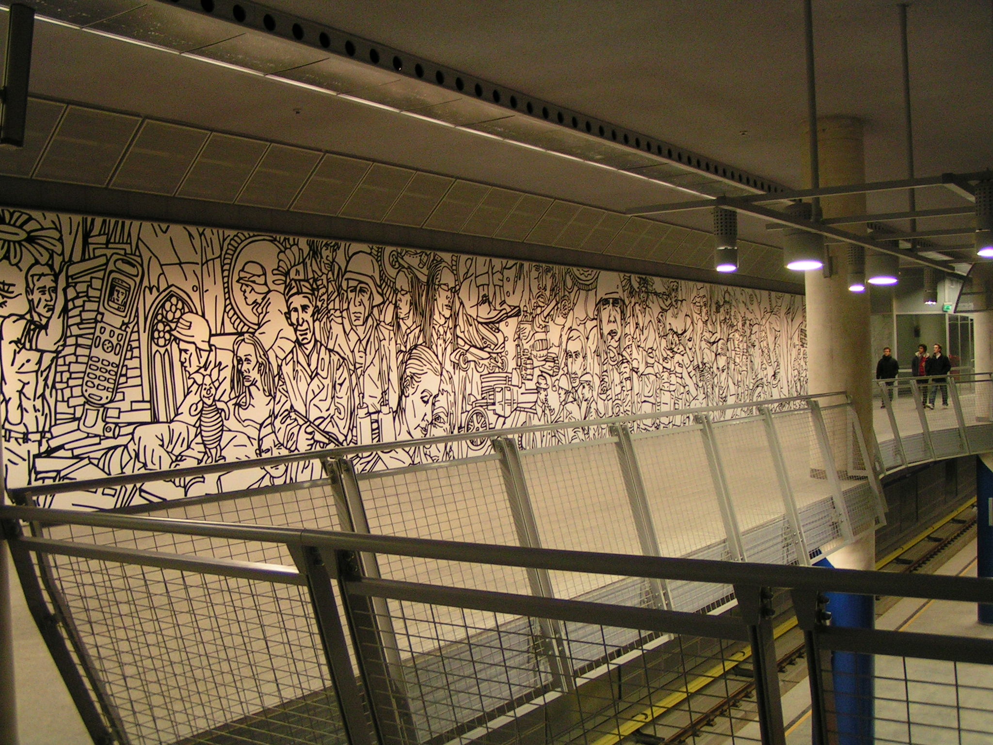 Sciana znajdująca się na galerii stacji Marymont przeznaczona do prezentacji dzieł artystów.